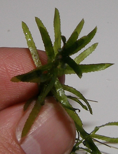 Hydrilla Verticillata close up